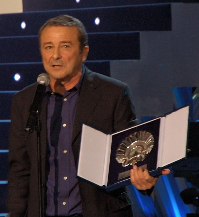 El actor español Juan Diego recogiendo la Concha de plata al Mejor Actor en el Festival de San Sebastian 2006.